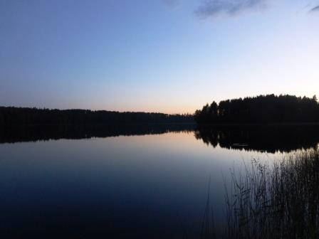 Белая ночь над озером Ангозеро в Кондопожском районе Республики Карелия (1 июля 2016 00:06 МСК).